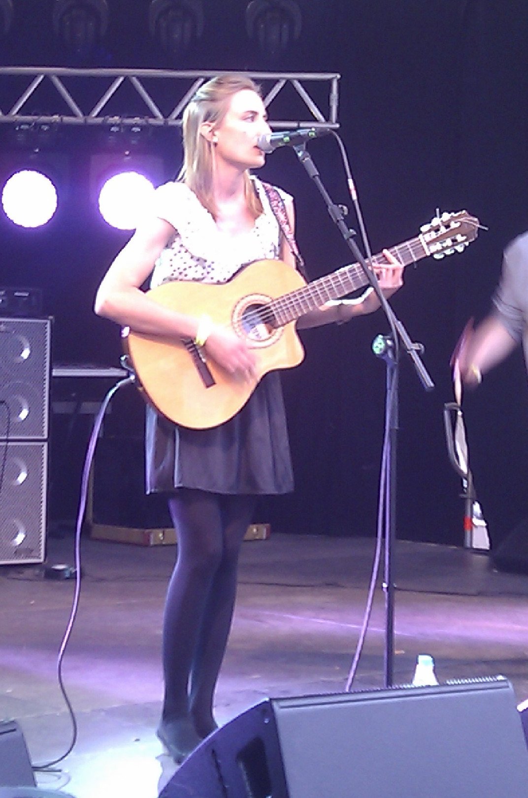 Die Singer-Songrwriterin Sarah Sophie (m.) beim Theatron MusikSommer 2014